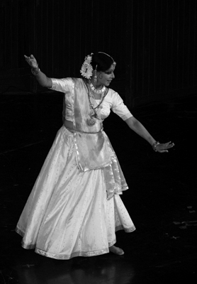 Shovana Narayan, noted Kathak dancer.